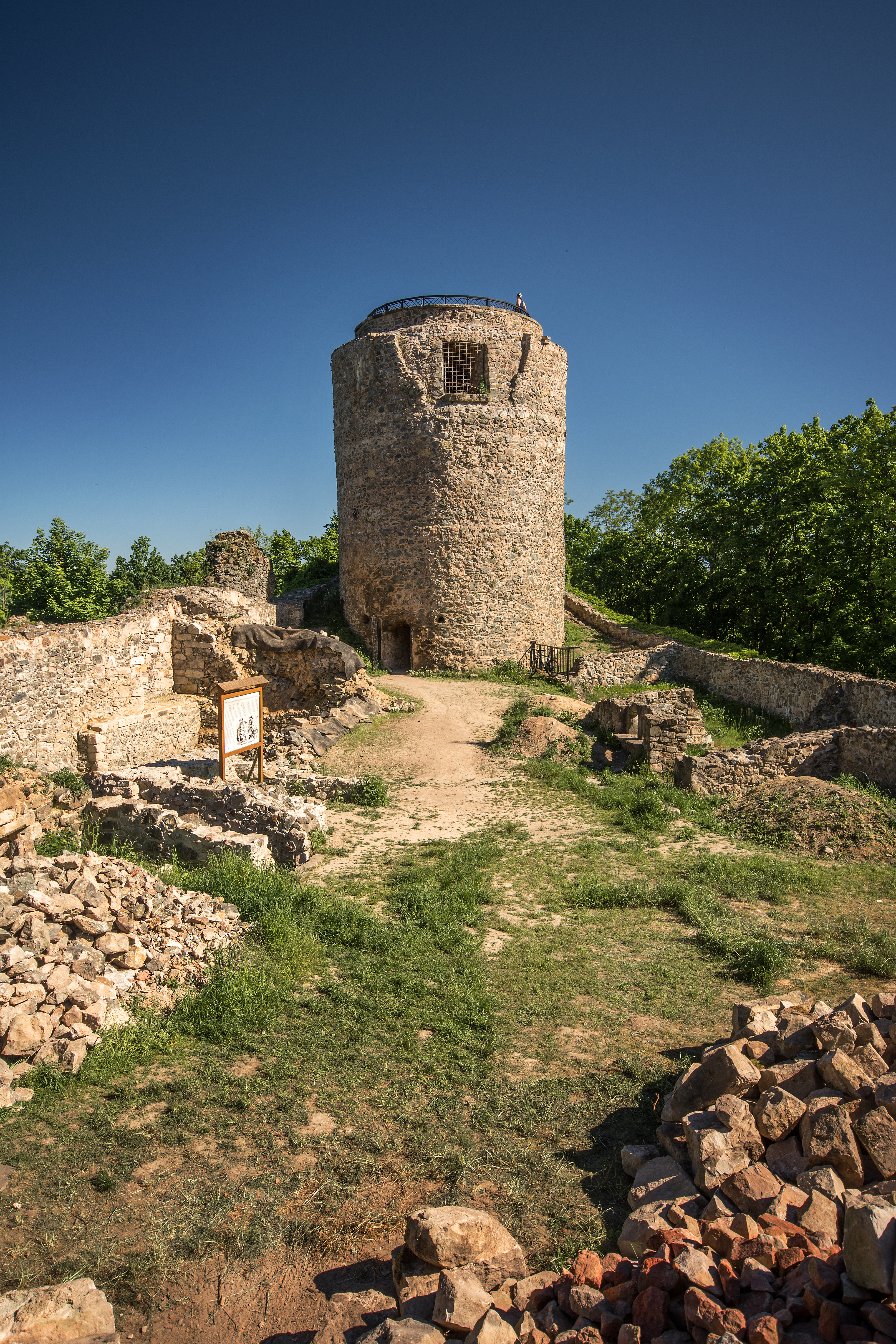 Łupki, ruiny zamku „Wleński Gródek”, XIII, XV Wikidata has entry 596187 with data related to this item.